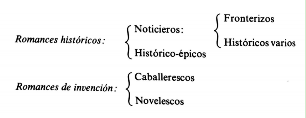 Clasificación de romances según Wolf y Hofmann